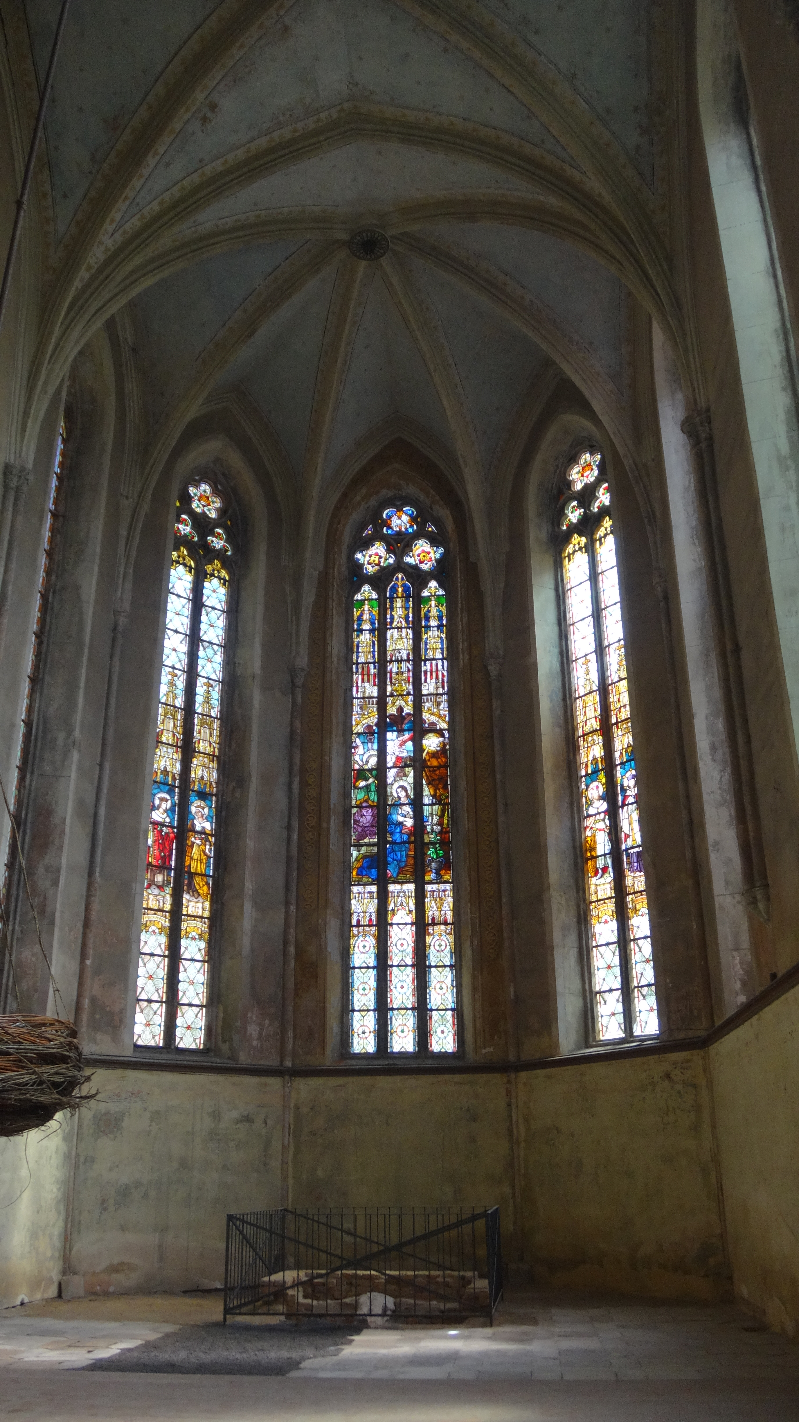 presbytář 2